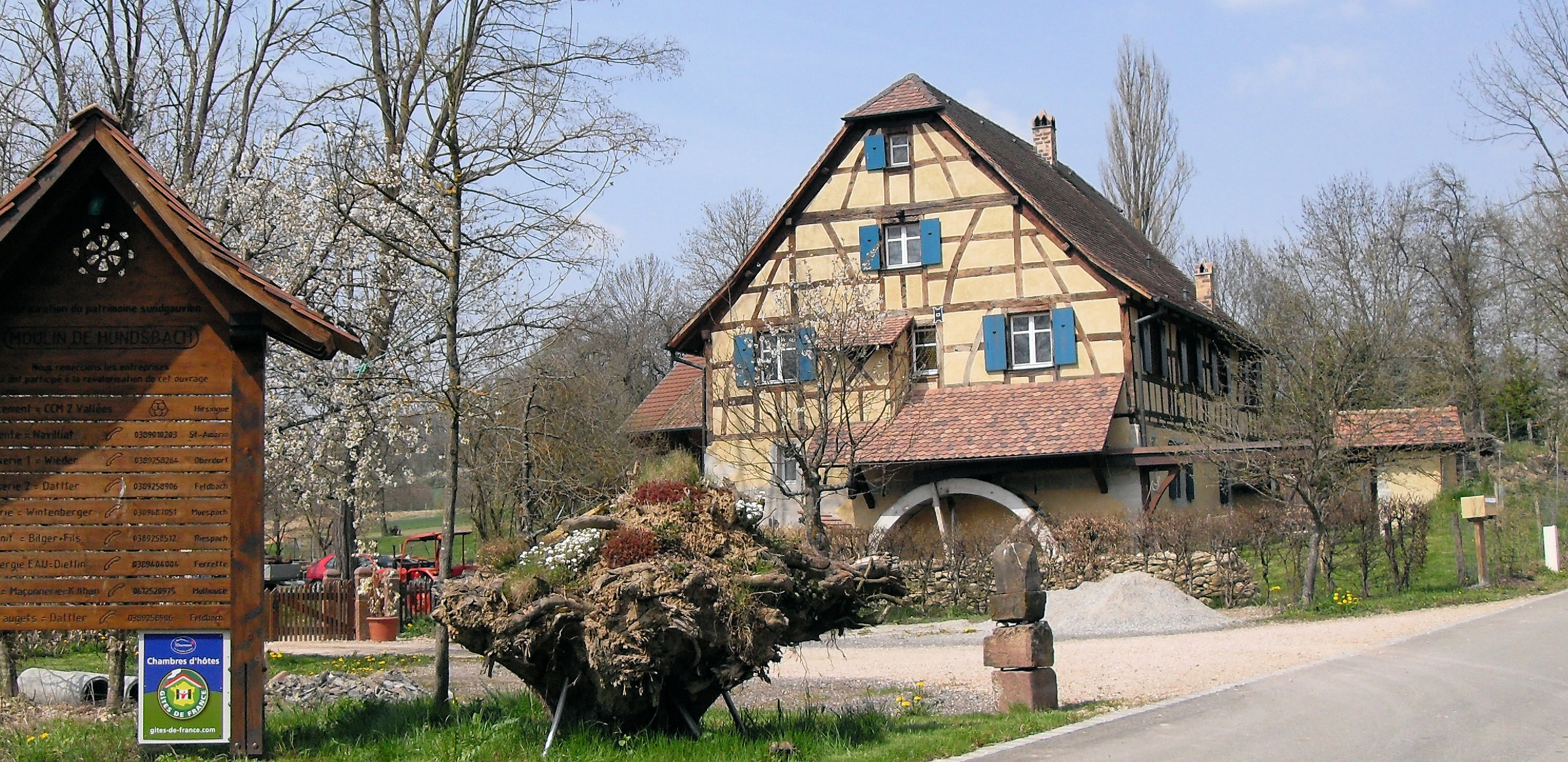 Ancien moulin à eau de Hundsbach